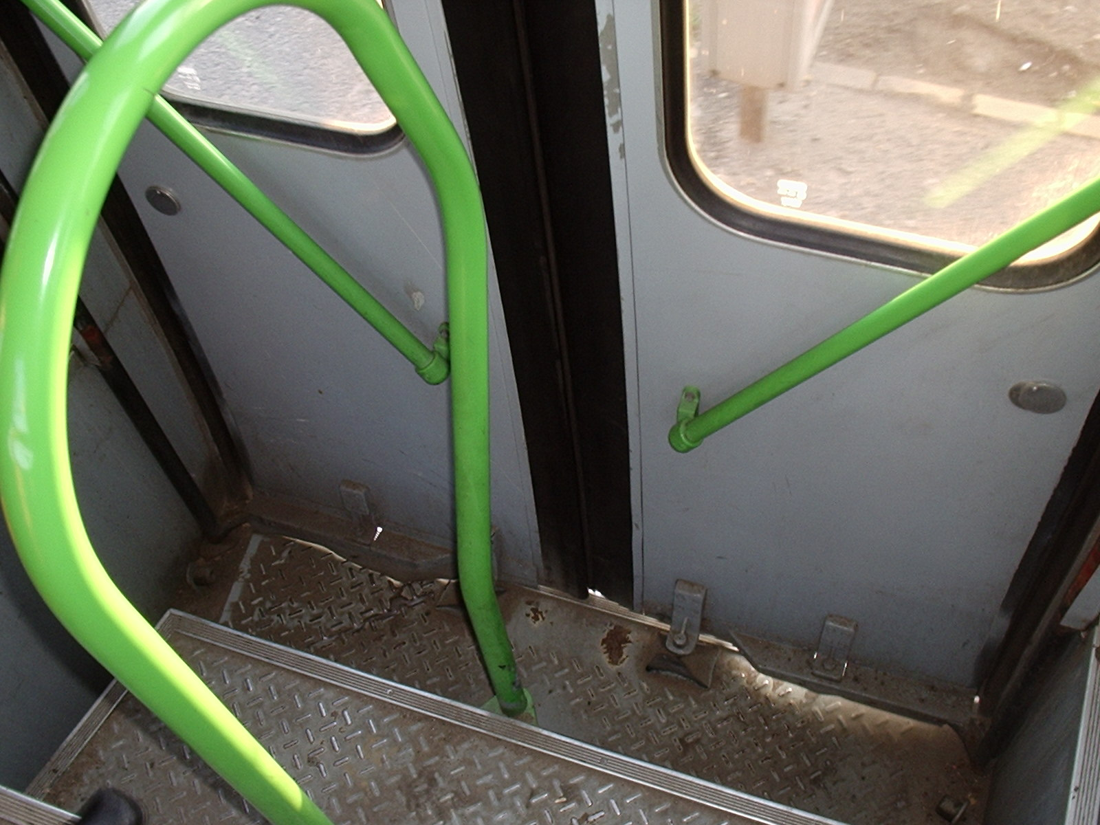 Busz bolygóajtajának belseje (Budapest, XVIII. kerület, Mednyánszki Utca)